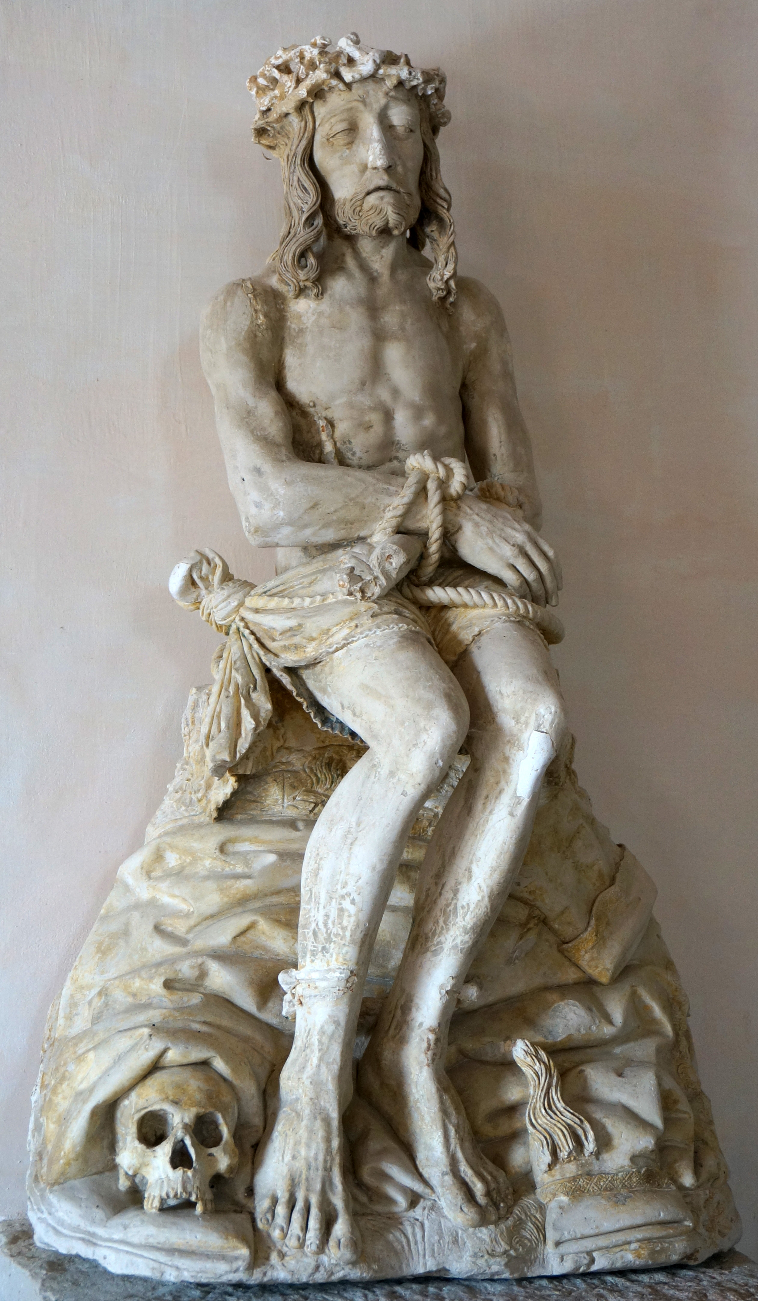 Église Saint-Pierre et nécropoles